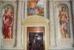 Villa Rigoni Savioli, uno scorcio della sala del biliardo e dei suoi affreschi.